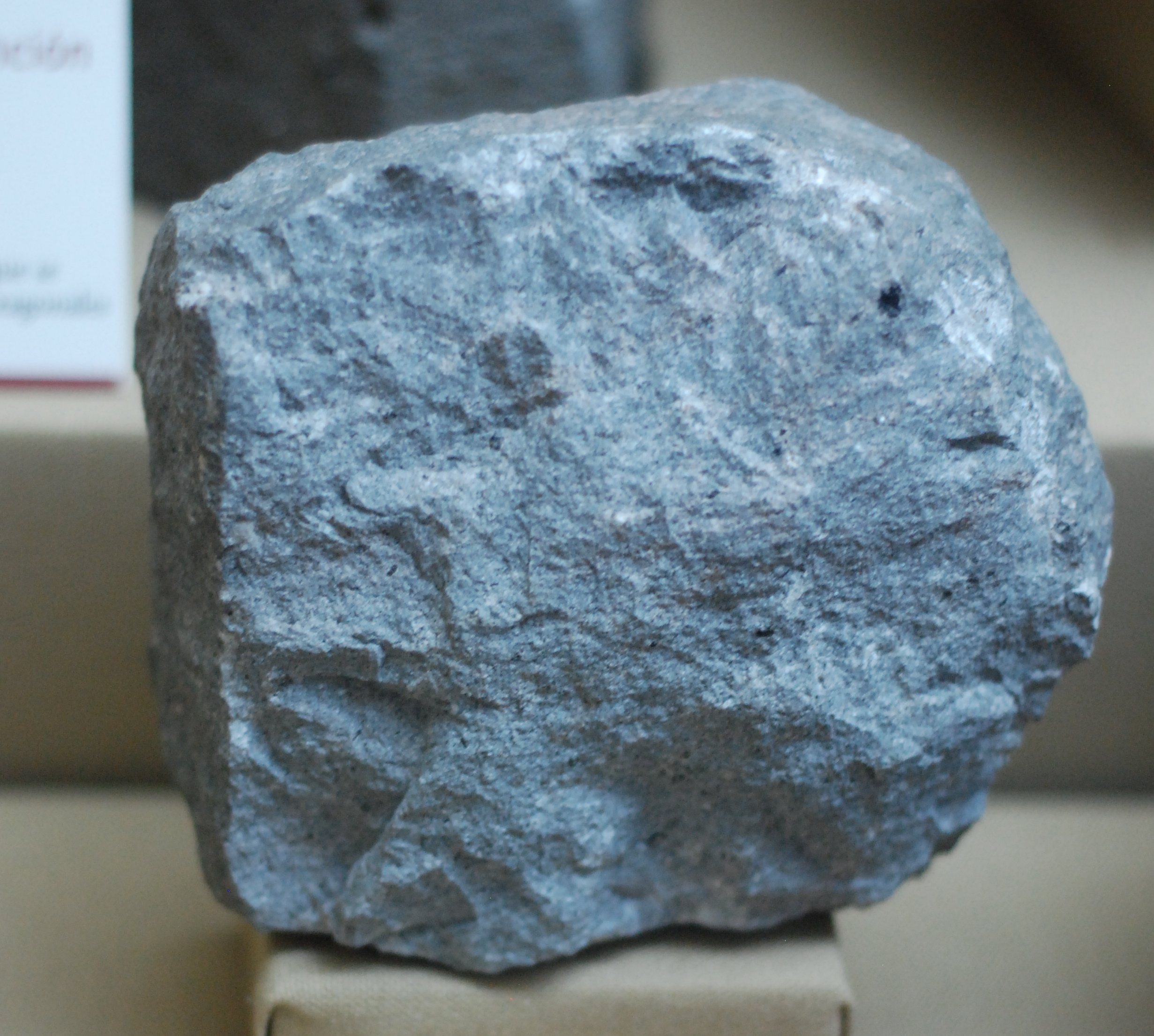 Andesita. Roca ígnea volcánica. Lava típica de los Andes Cordillera de los Andes, Córdoba, Argentina.